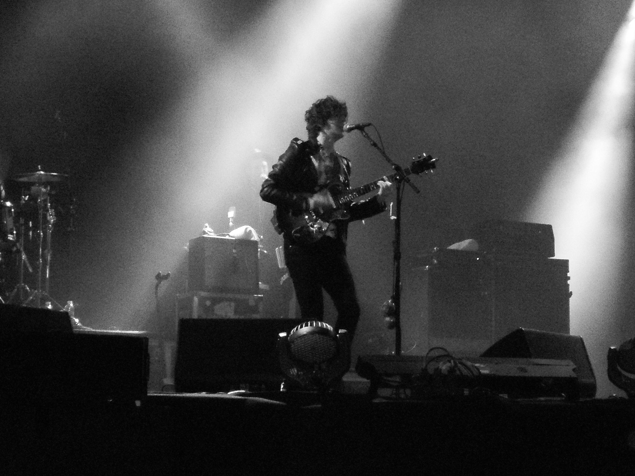 Concierto en 2013, festival SOS 4.8